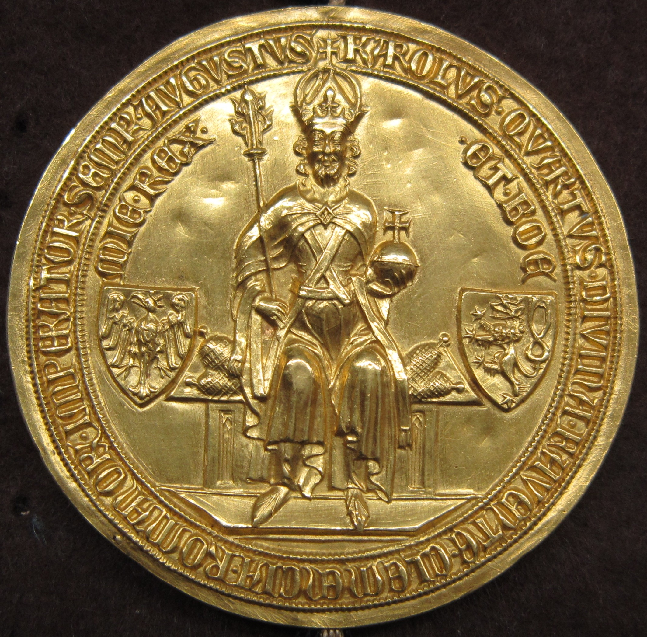 Nahaufnahme des Trierer Exemplars der Goldenen Bulle im Hauptstaatsarchiv Stuttgart.